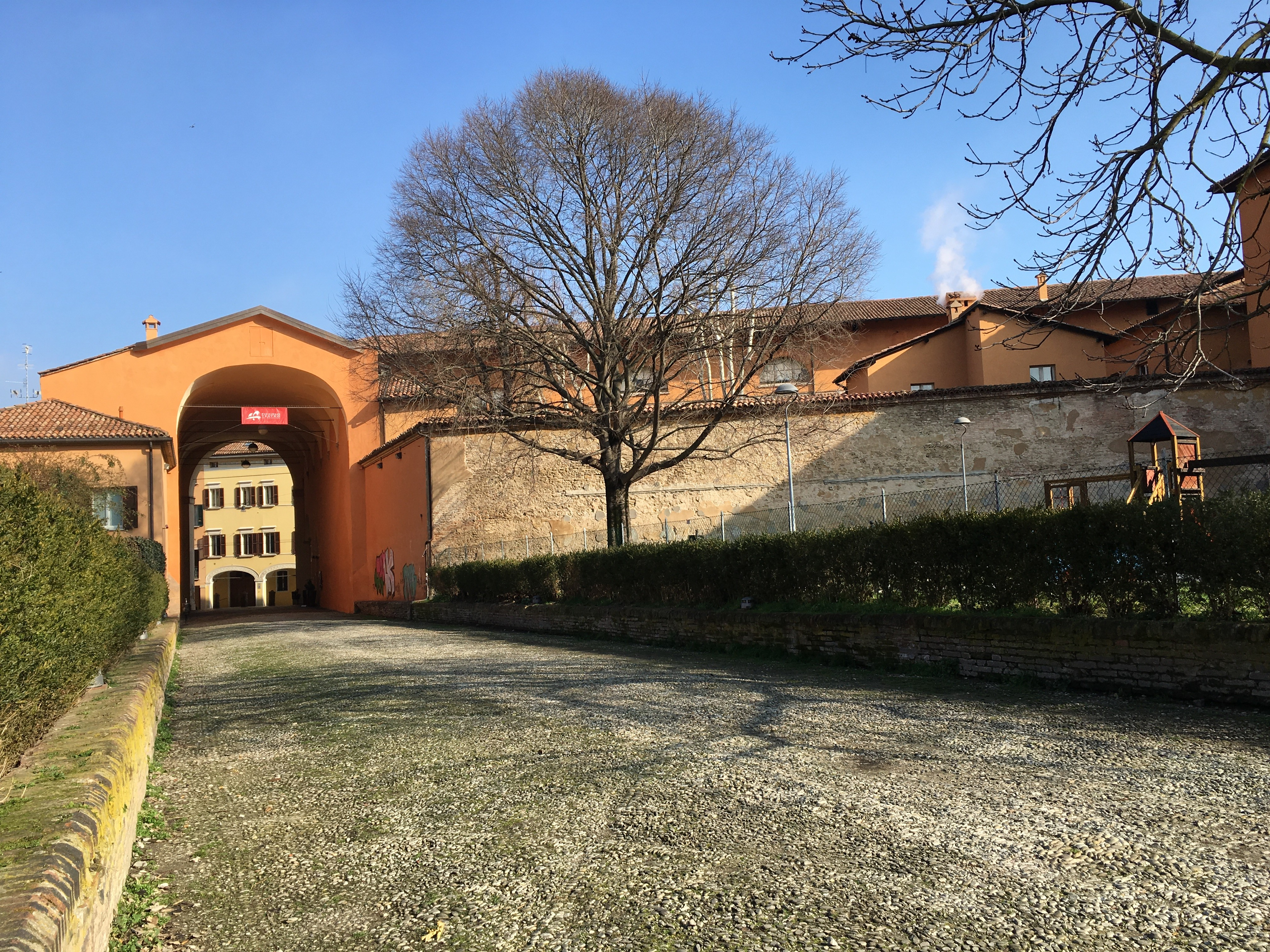 arco del baraccano bologna